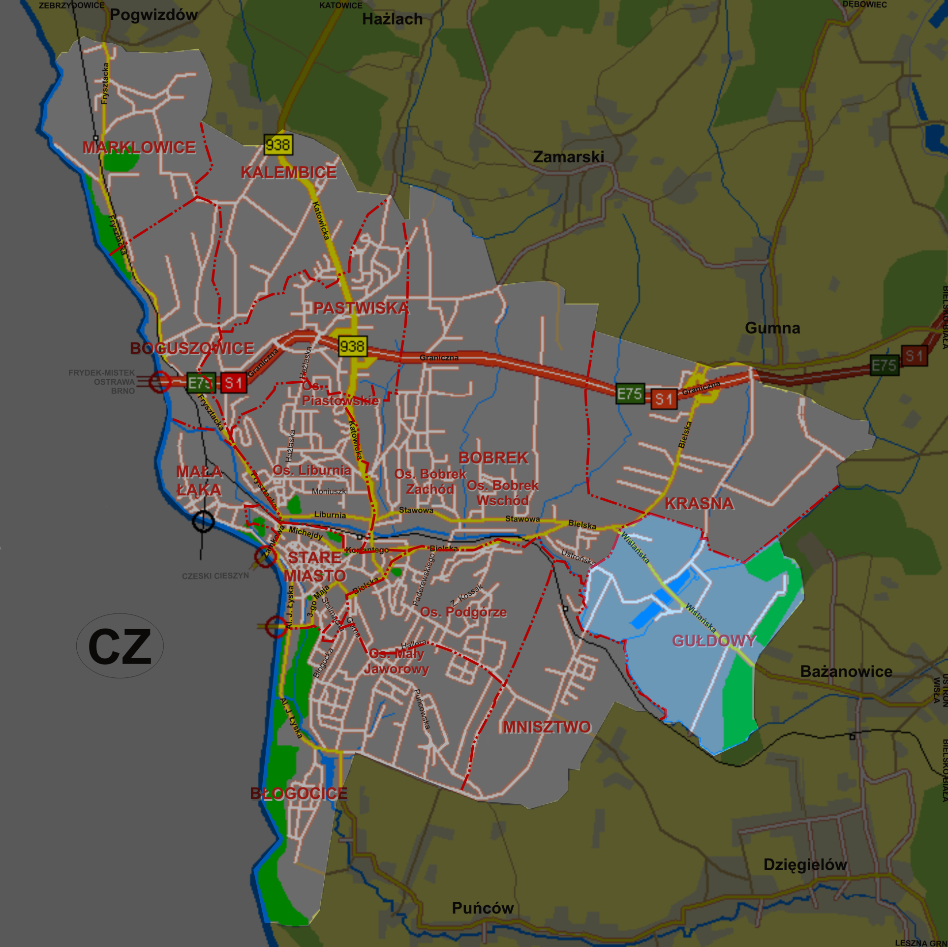 Gułdowy, dzielnica Cieszyna